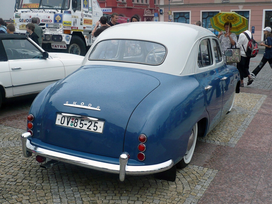 Škoda 1201 - Trofeo Niké Bohemia 2010 - Děčín